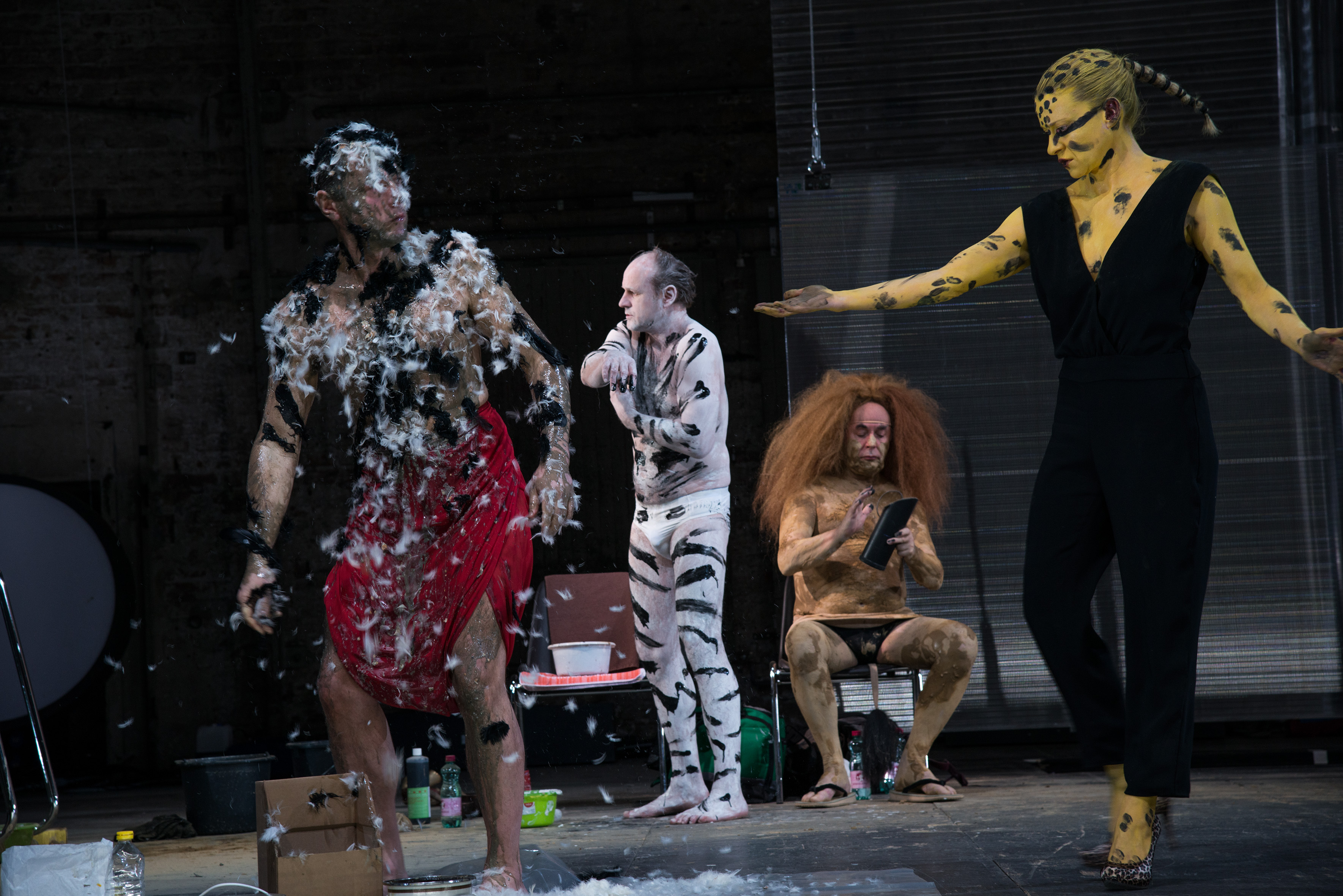 Theaterstück Das Reich der Tiere. Akademietheater Wien